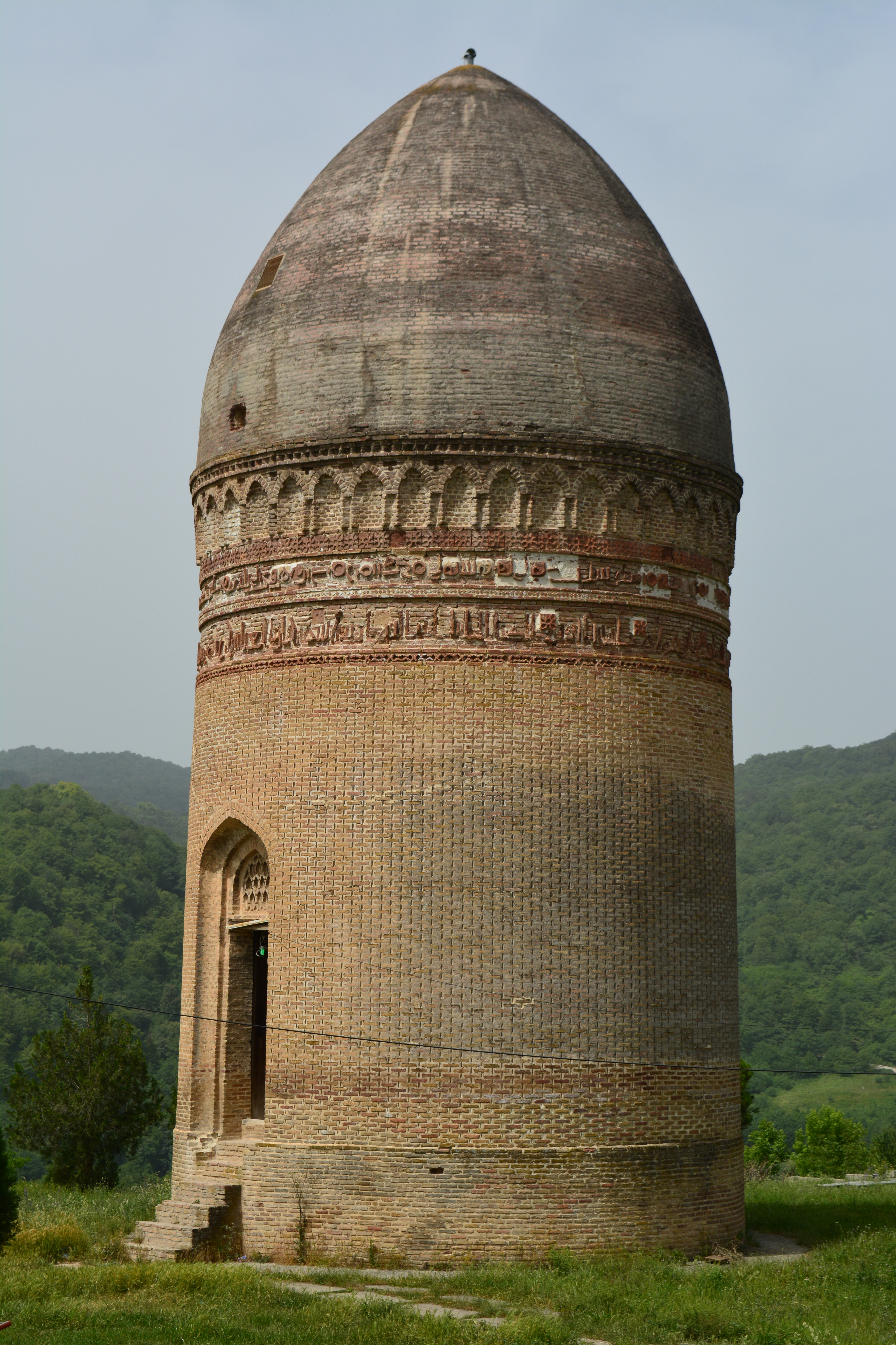 برج لاجیم